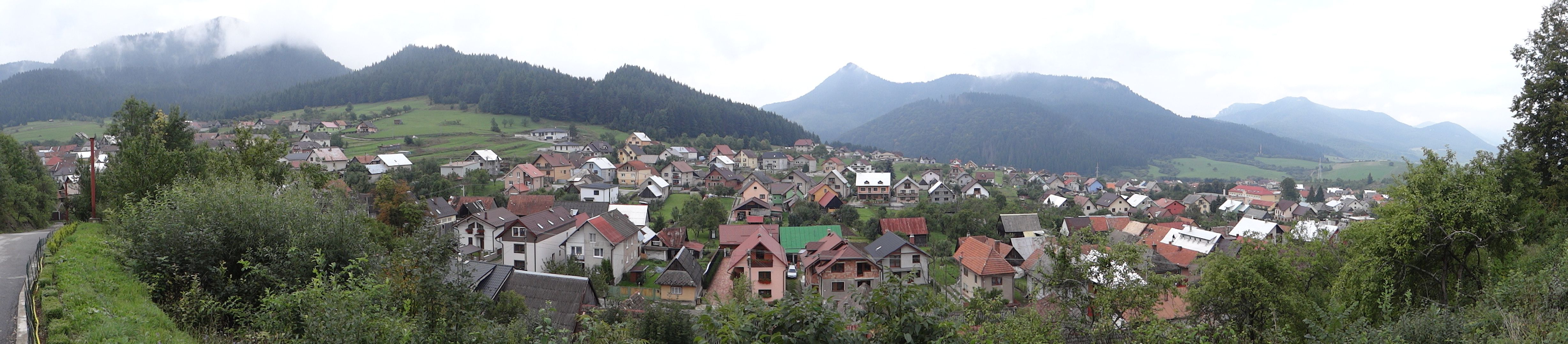 Komjatná, panorama